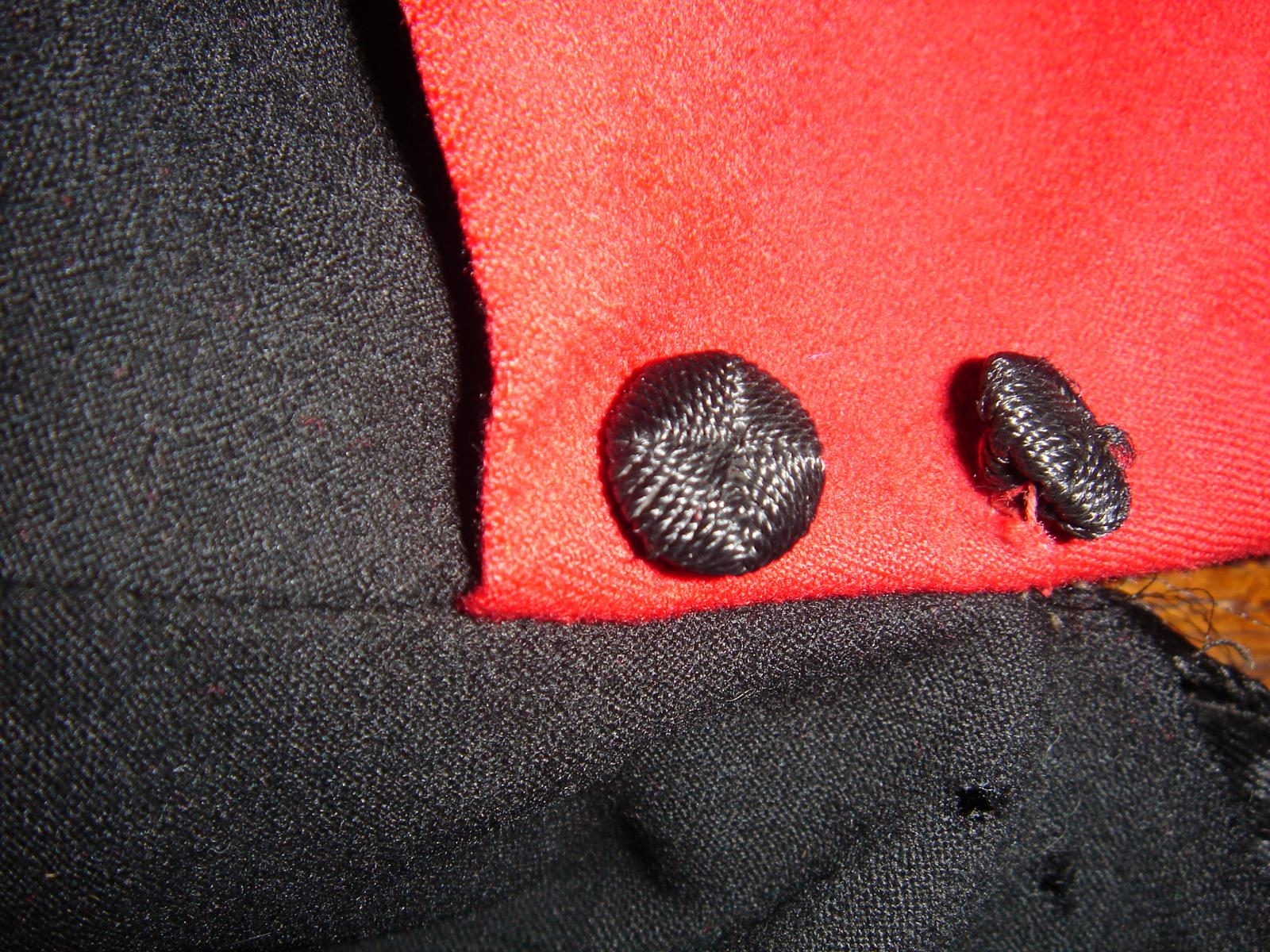 Bouton de toge (fileté conforme aux textes)